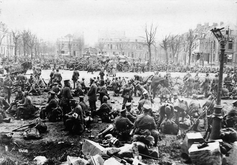 Kurze Rast auf einem Platz in Armentiéres. 8408 BUFA